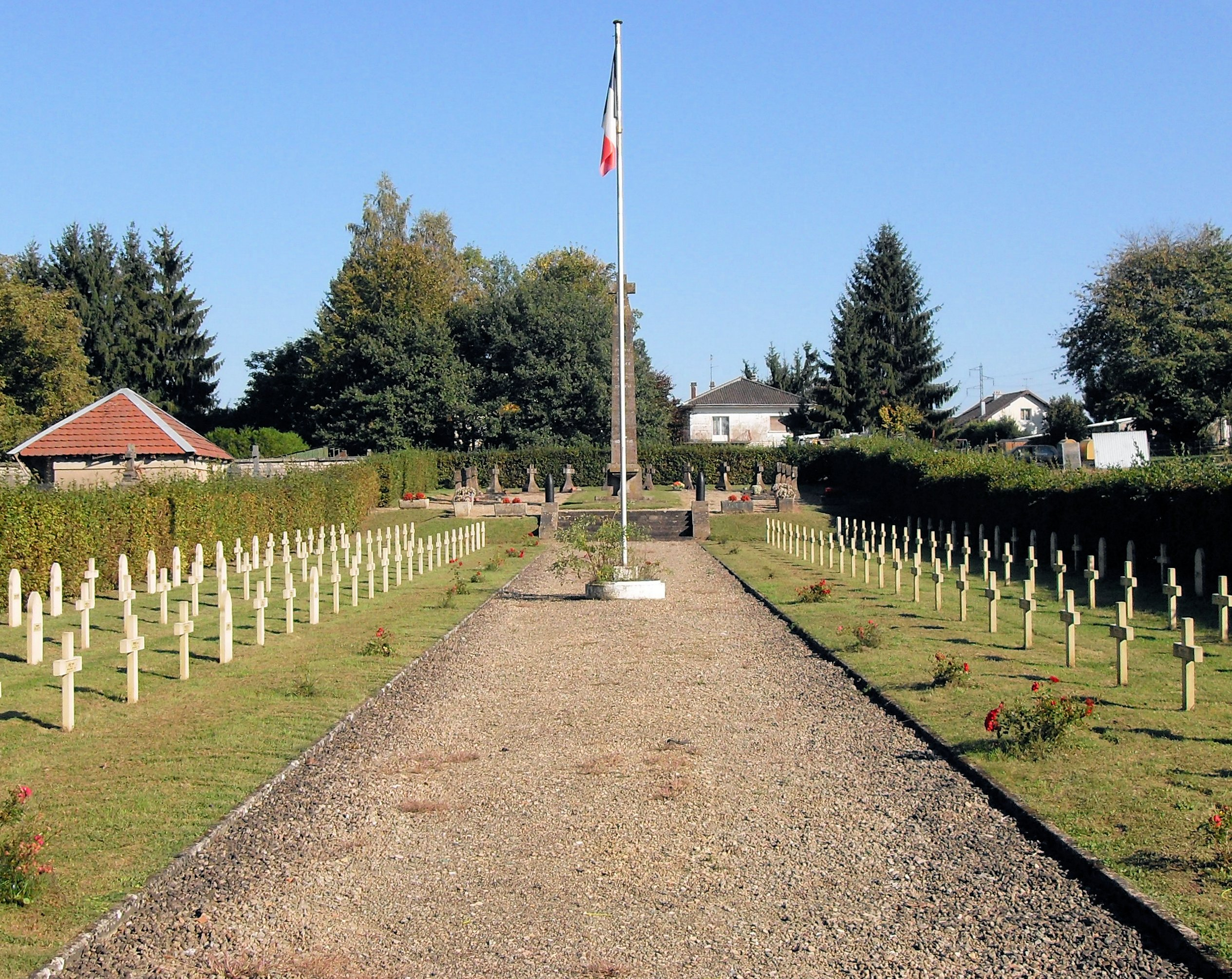 Cimetière militaire francais de la Première Guerre mondiale à Morvillars, Territoire de Belfort, France